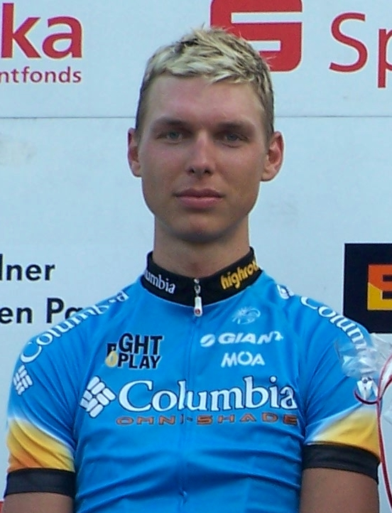 Die Aufnahme entstand beim Einzelzeitfahren der Sachsen-Tour 2008 in Großenhain